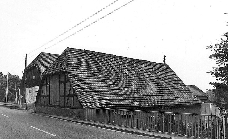 Original image description from the Deutsche Fotothek Kreba-Neudorf-Kreba. Ehem. Hammerwerk